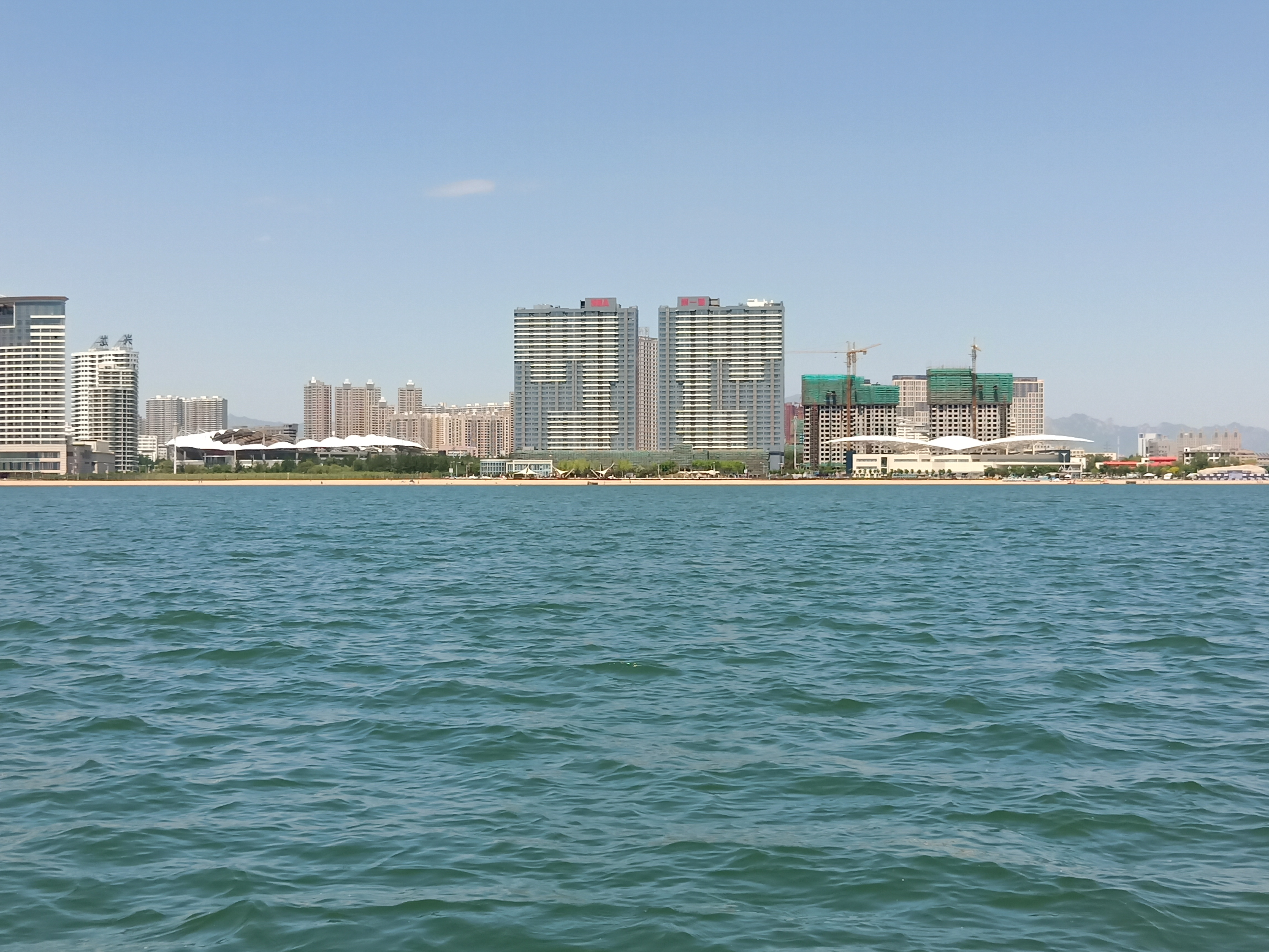 粵語: 喺渤海上邊望去金夢海灣·第一觀嗰邊